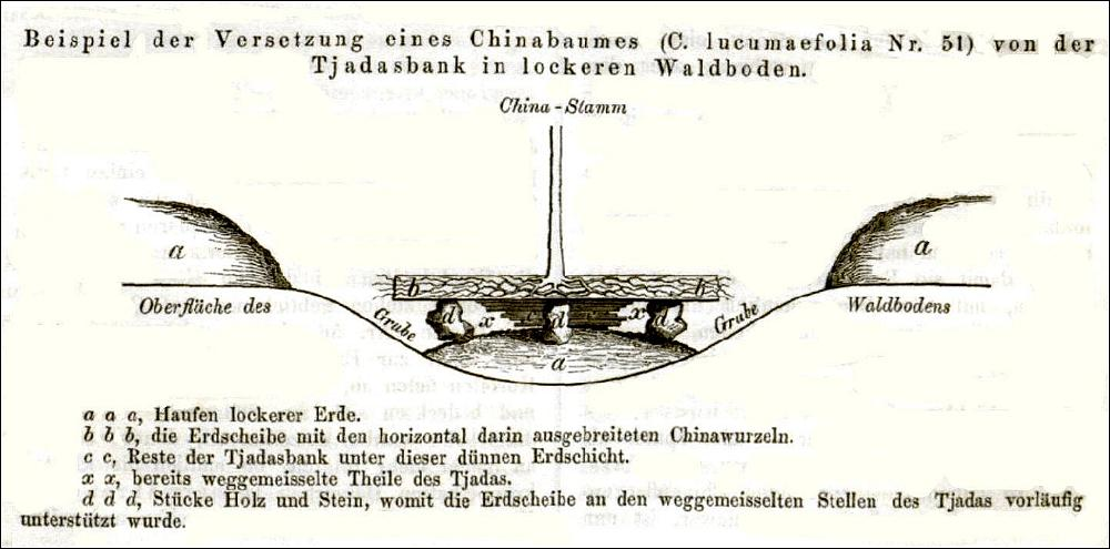 Junghuhns Anleitung für die Versetzung eines Chinabaumes